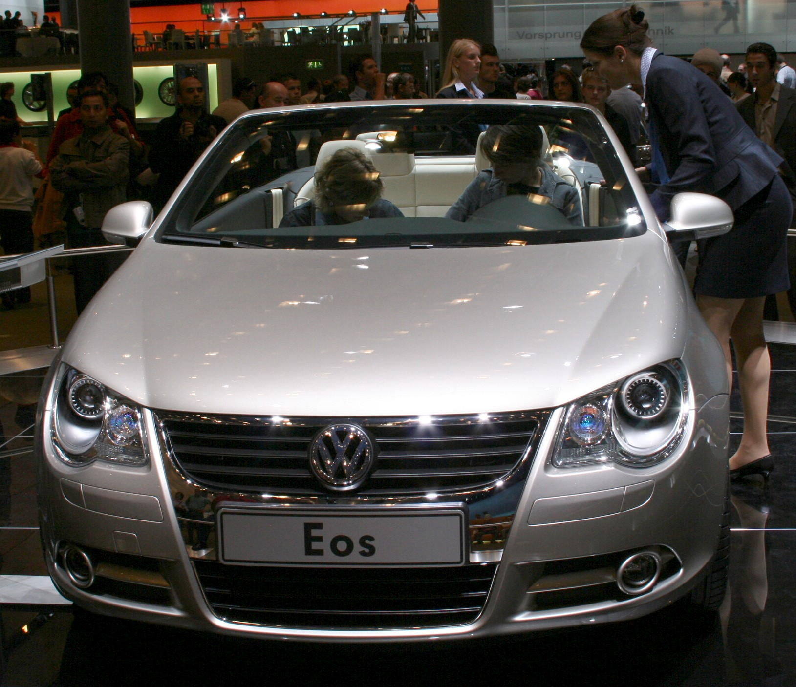 Volkswagen Eos on IAA 2005 Photo taken by Ygrek, 17th September 2005.